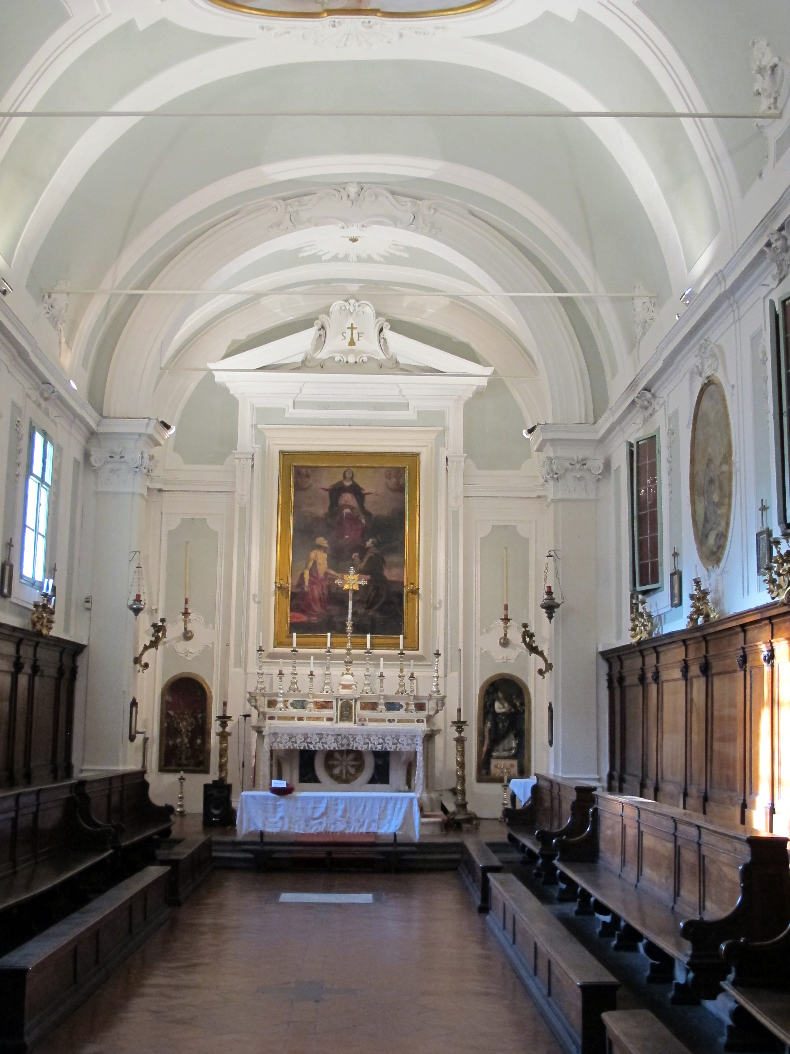 Firenze